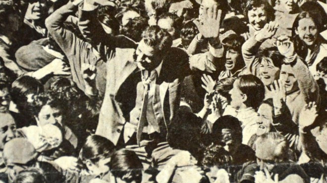 Cipolletazo (1969). Cipolletti, Río Negro, Argentina